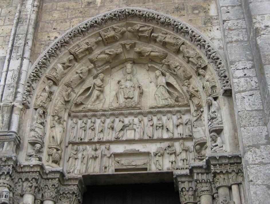 Portail droite du porche occidental de la cathédrale de Chartres